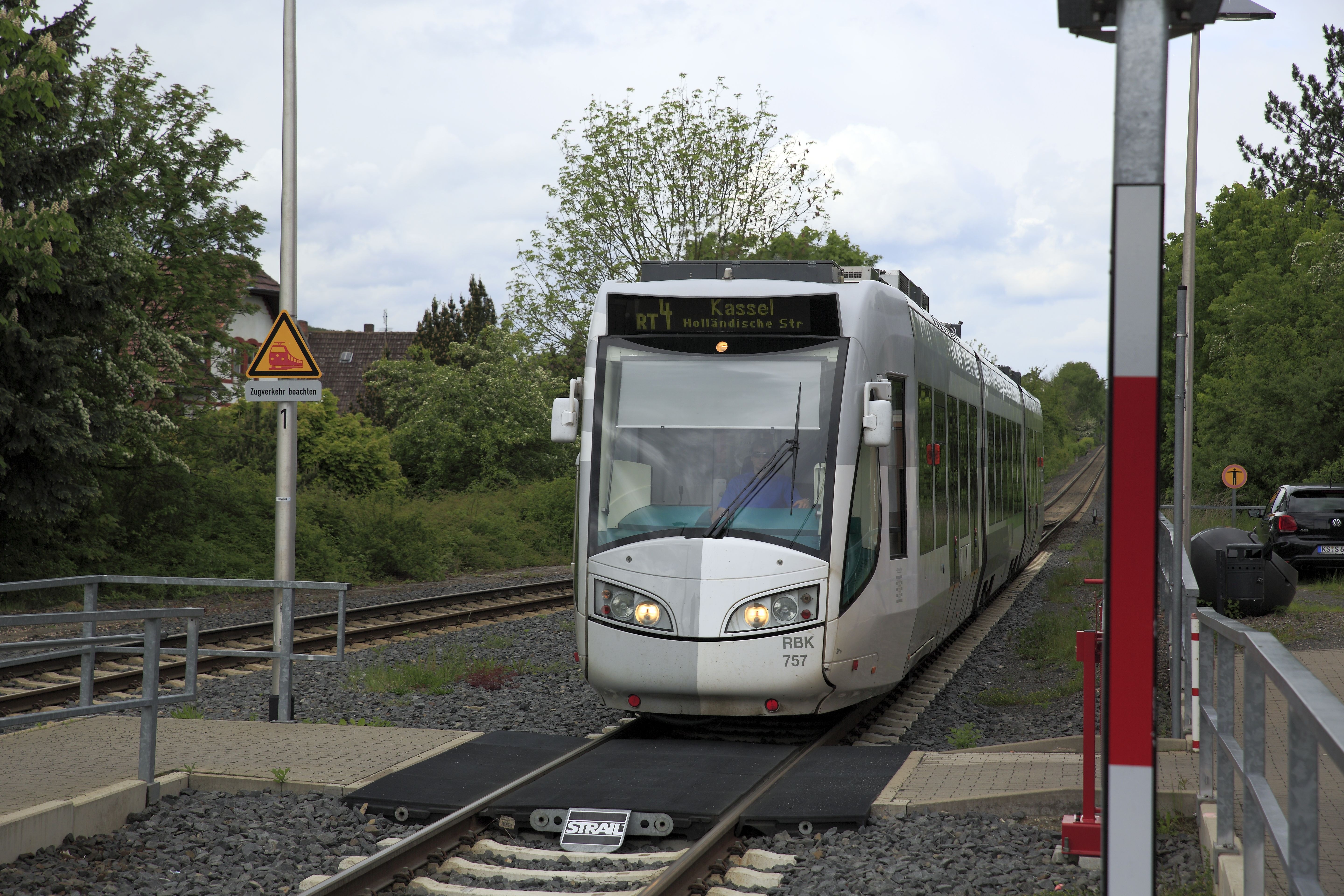 Zug der Regiotram-Linie RT 4 von Wolfhagen nach Kassel, Holländische Straße. Wegen der fehlenden Fahrleitung zwischen Wolfhagen und Obervellmar müssen hier die Zweikrafttriebwagen eingesetzt werden, die zwischen Kassel Hbf und Wolfhagen im Dieselbetrieb verkehren.